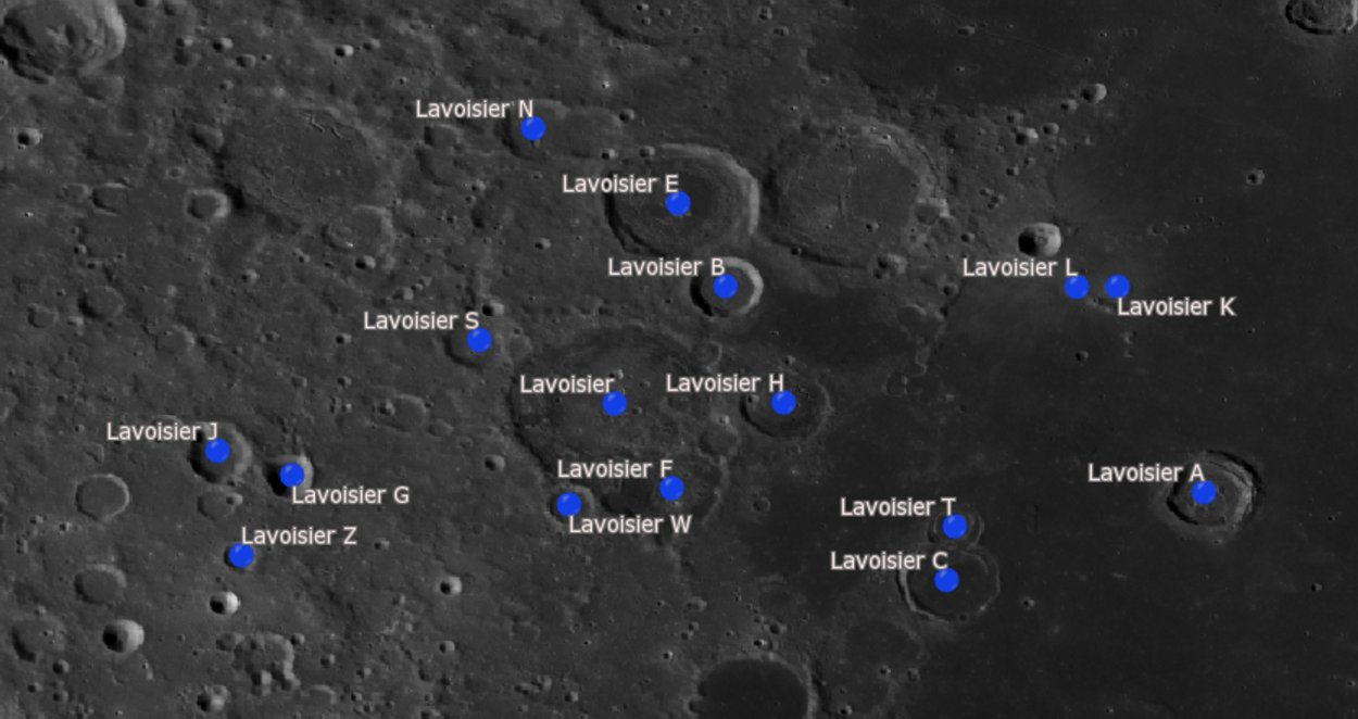 Cráter lunar Lavoisier. Cráteres satélite. (Imagen LRO)